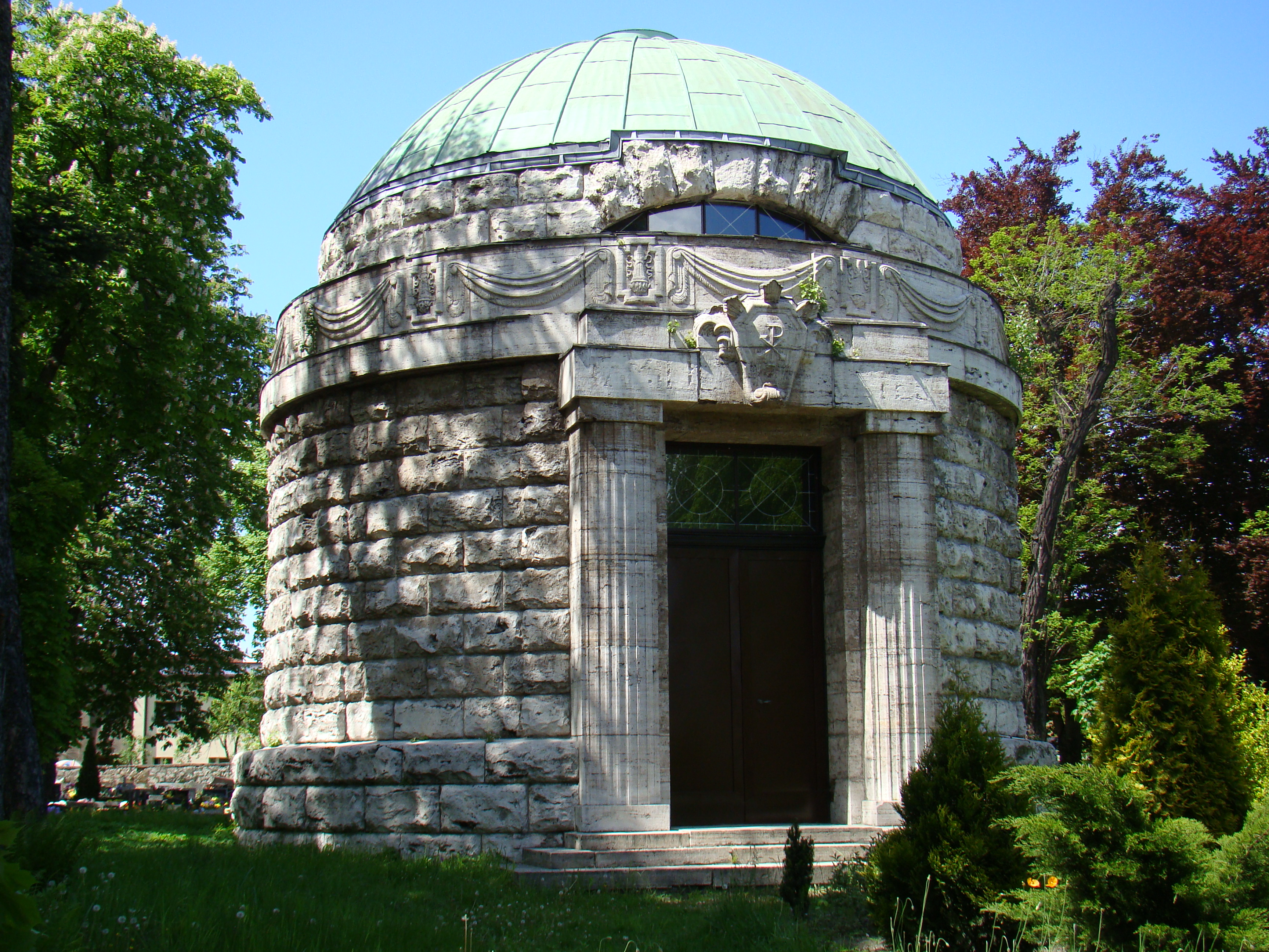 Sosnowiec, mauzoleum rodziny Dietlów, ob. kaplica cmentarna ewangelicka, 1912